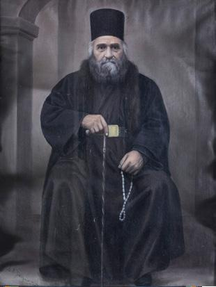 Портрет на игумена на Лешочкия манастир, Езекиил, Лешочки манастир, с. Лешок, 1927 година. Автор: Димитър Андонов Папрадишки от с. Папрадиште, Велешко. Платно, темпера. Размери: 77,5 Х 55,5 см.